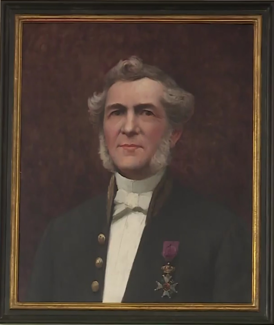 Hippolyte Joseph Trémouroux (Perwez, 8 octobre 1803 - Orbais, 16 mai 1888) est un député et sénateur belge.